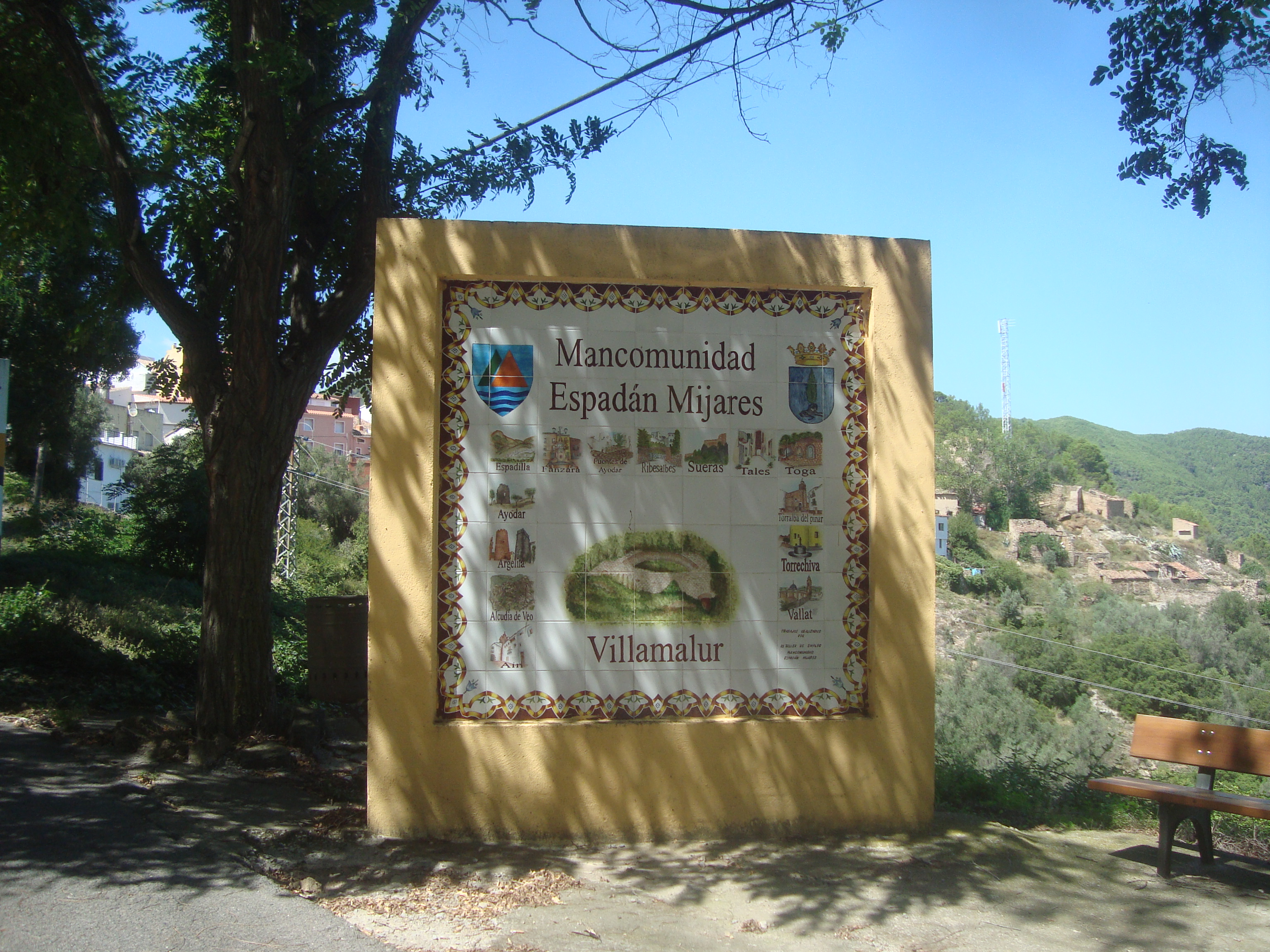 Villamalur (Castellón). La Mancomunidad Espadán-Mijares es una mancomunidad de quince municipios de la provincia de Castellón (España), situada entre las comarcas del Alto Mijares y la Plana Baja y que comprende parte del Parque natural de la Sierra Espadán y del Río Mijares. Los municipios que la forman son: Aín, Alcudia de Veo, Argelita, Ayódar, Espadilla, Fanzara, Fuentes de Ayódar, Ribesalbes, Sueras, Tales, Toga, Torralba del Pinar, Torrechiva, Vallat y Villamalur. En el conjunto de los quince municipios existe una población aproximada de 4.500 habitantes.